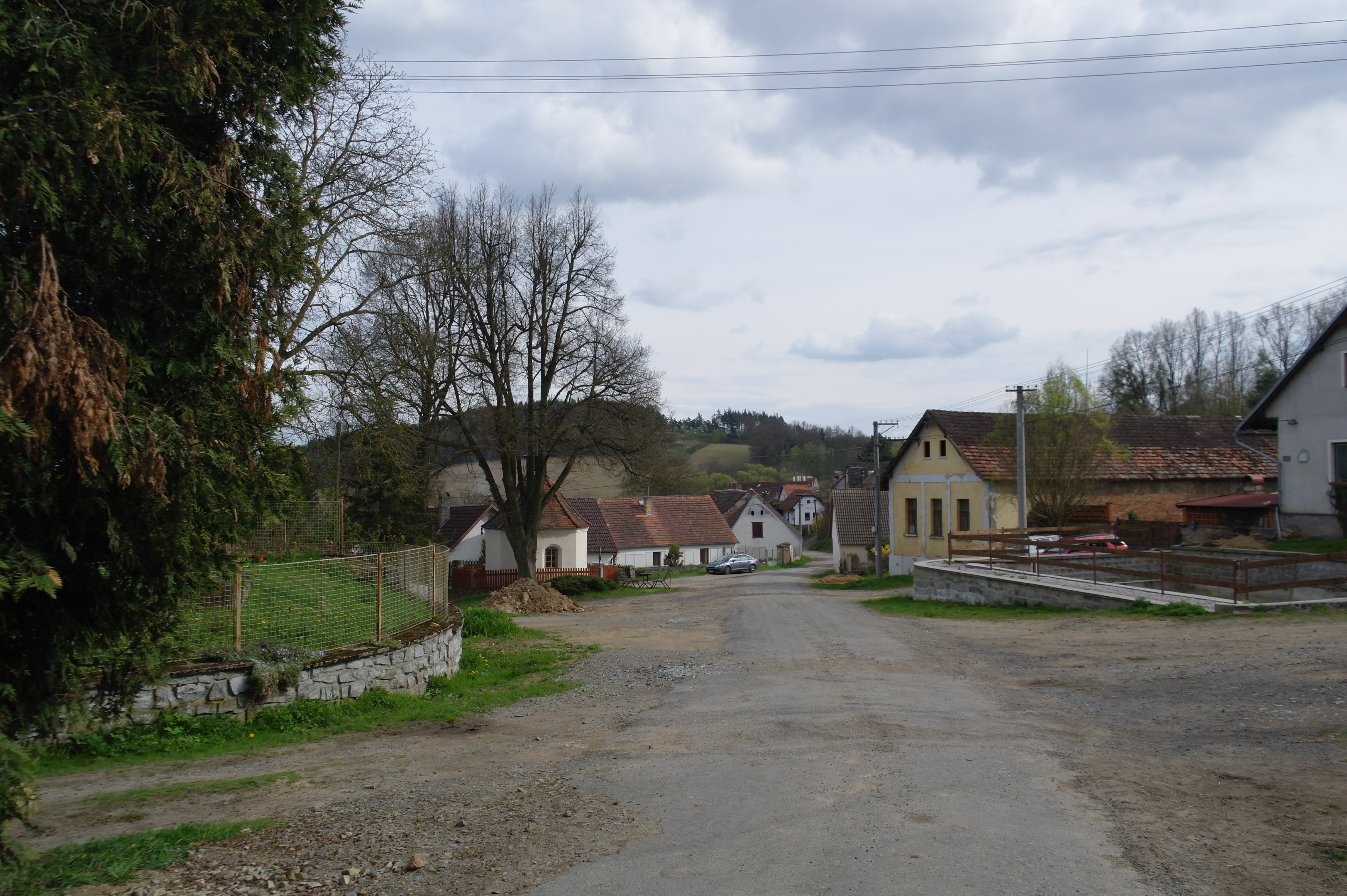 Kovčín